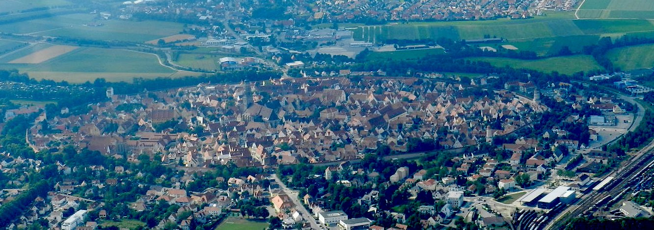 Nördlingen von oben